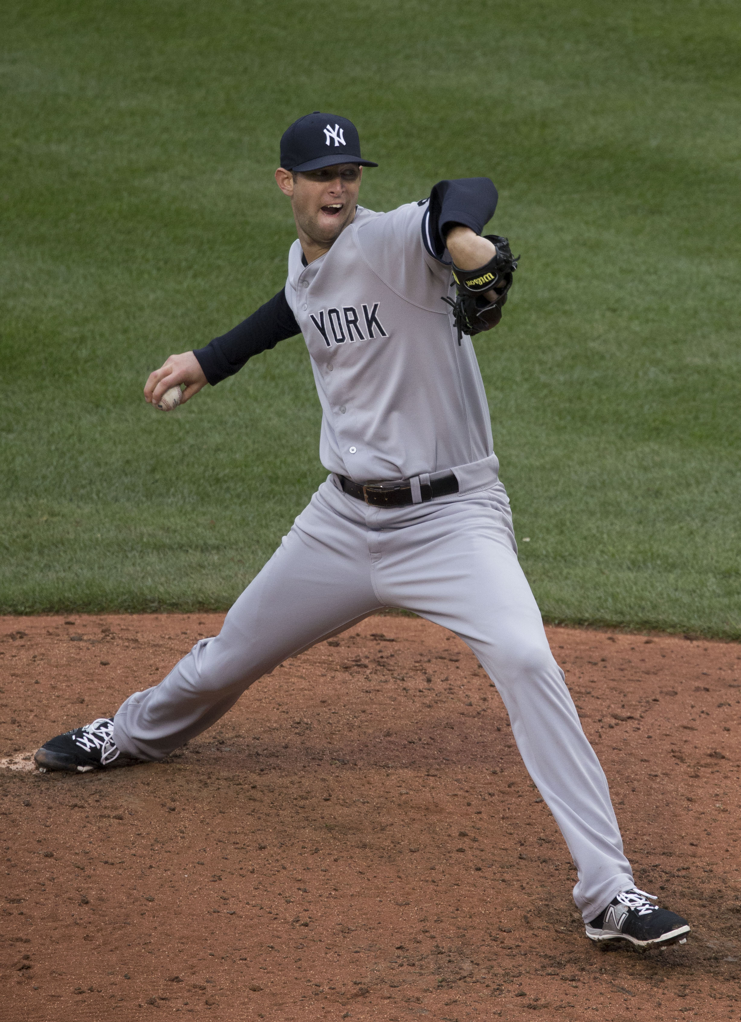 Yankees at Orioles 10/03/15